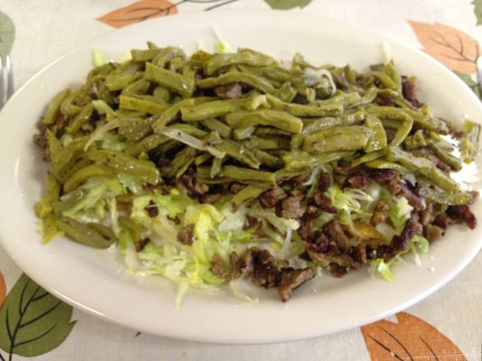 huarache de nopal